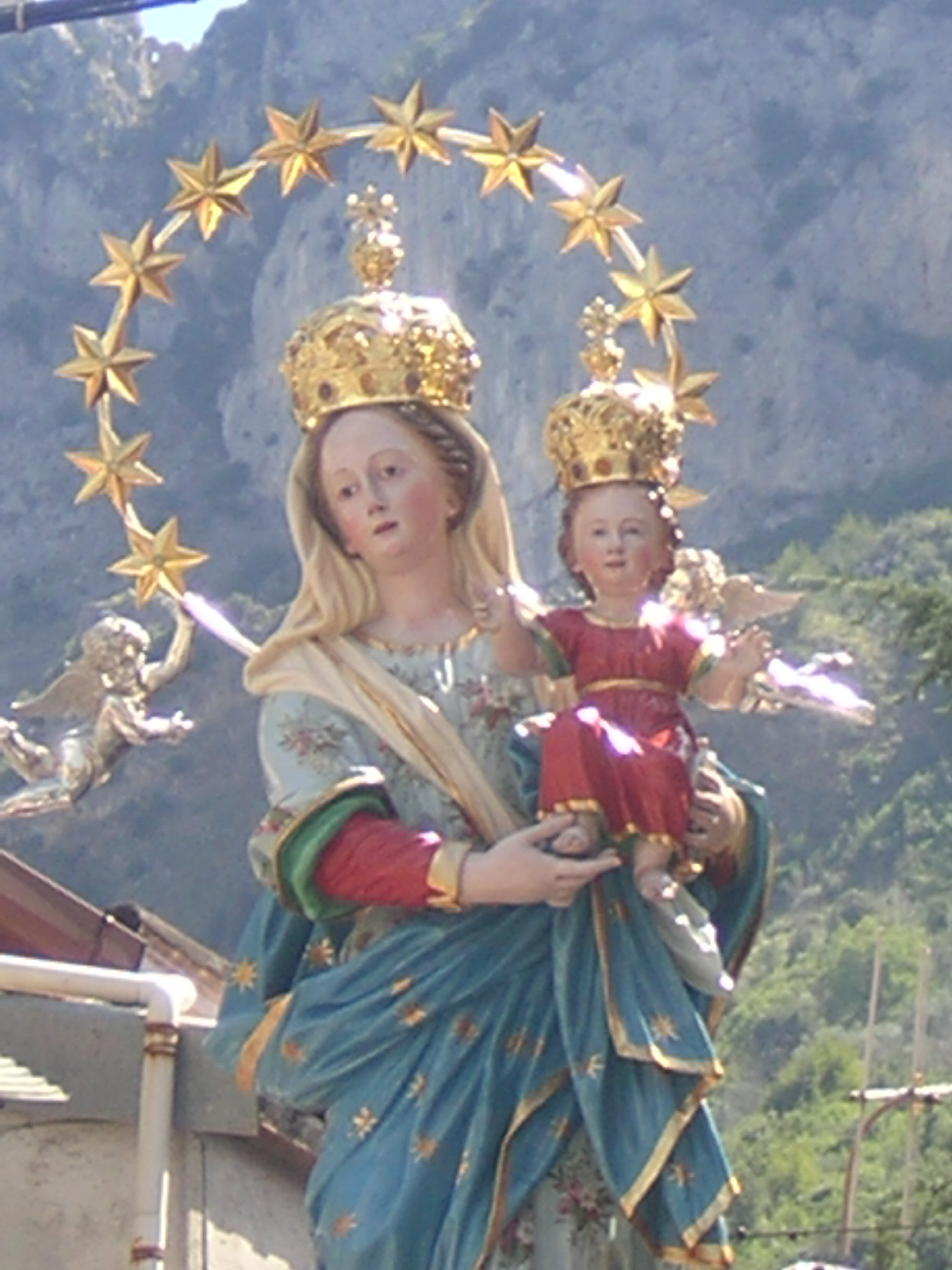 Mamma Nostra bivongi, 11/09/2005 foto cannarozzo